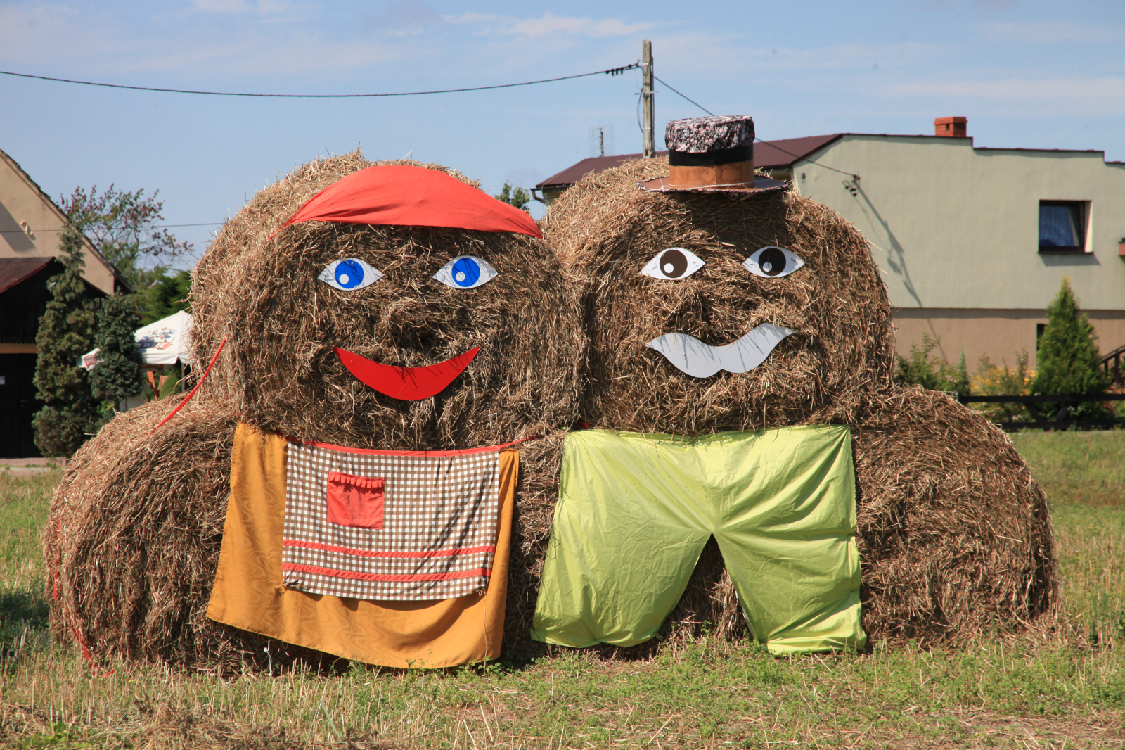 Dożynki w Łączy